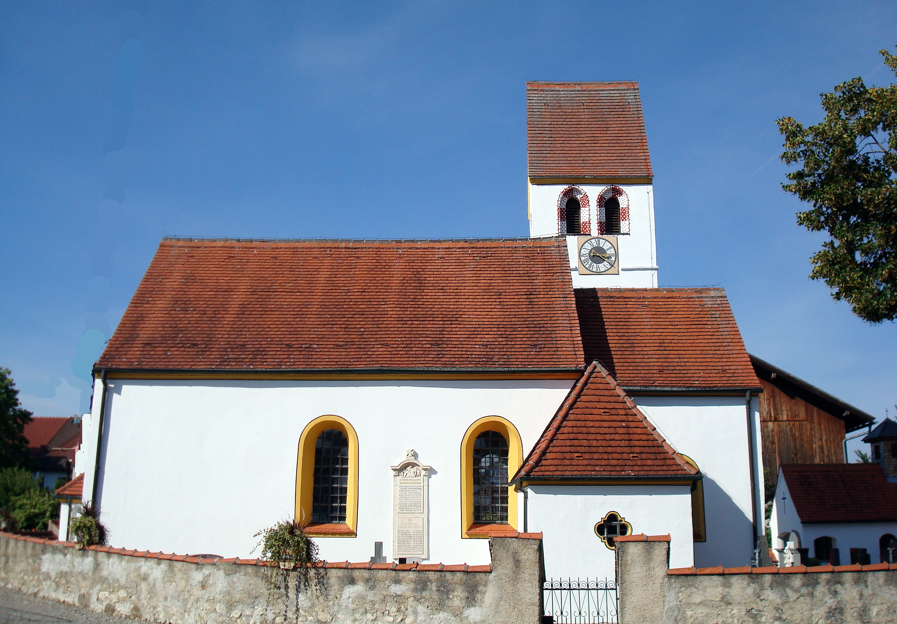 Pöcking, Ortsteil Aschering, St.-Sebastian-Straße 18. Kirche St. Sebastian. Erste Hinweise auf eine Kirche in Aschering stammen aus dem Jahre 1263. Die gotischen Spitzbogenfenster an drei Seiten des Turmes lassen darauf schließen, dass die heutige Kirche im ausgehenden 15. Jahrhundert erbaut wurde. Eine Inschrift auf der ältesten Kirchenglocke datiert ihren Guss auf das Jahr 1519. Der Innenraum der Kirche erhielt 1768 bei einer umfasssenden Renovierung seine spätbarocke Gestaltung.[1]This is a photograph of an architectural monument.